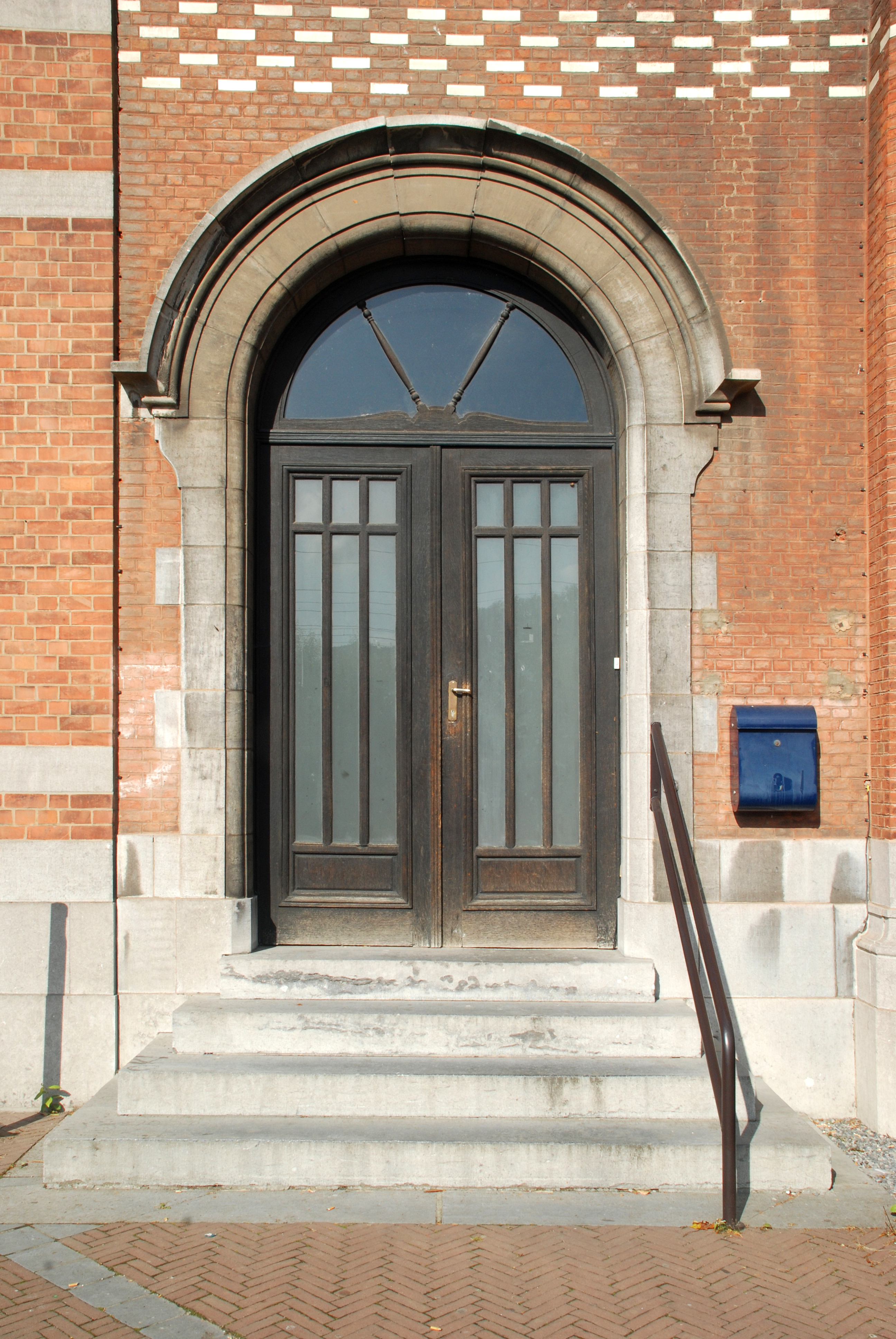 Belgique - Brabant wallon - Court-Saint-Étienne - Dispensaire des Usines Henricot